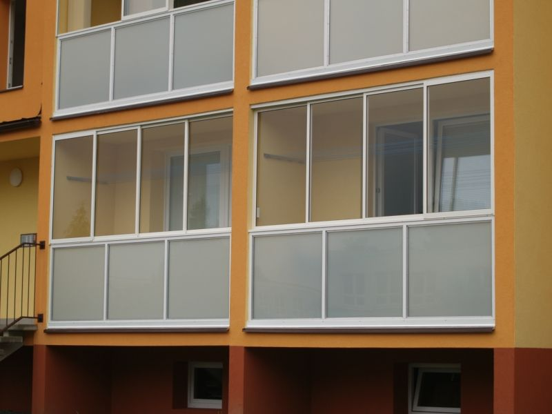 Ukázka bezrámového zasklení